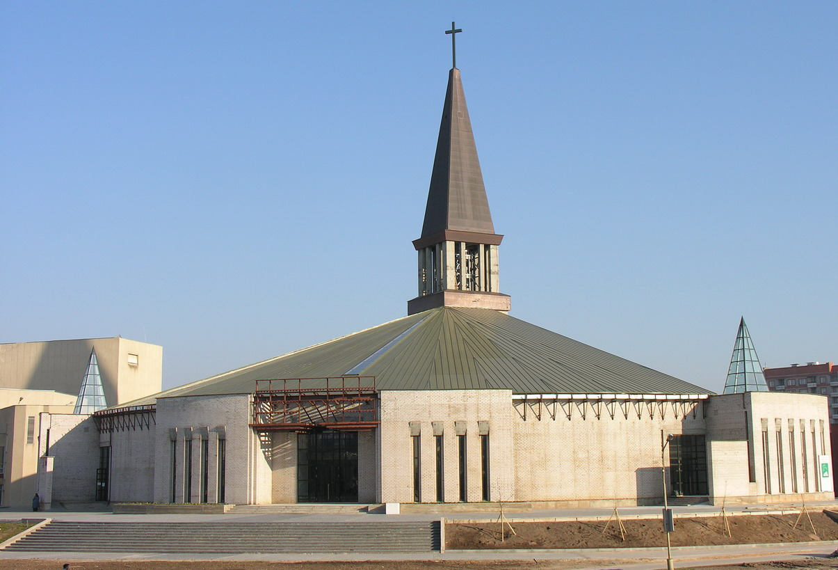 Mažeikių Švč. Asyžiečio bažnyčia (past. 2005 m.) Foto: Algirdas, 2005 m. lapkričio 2 d.